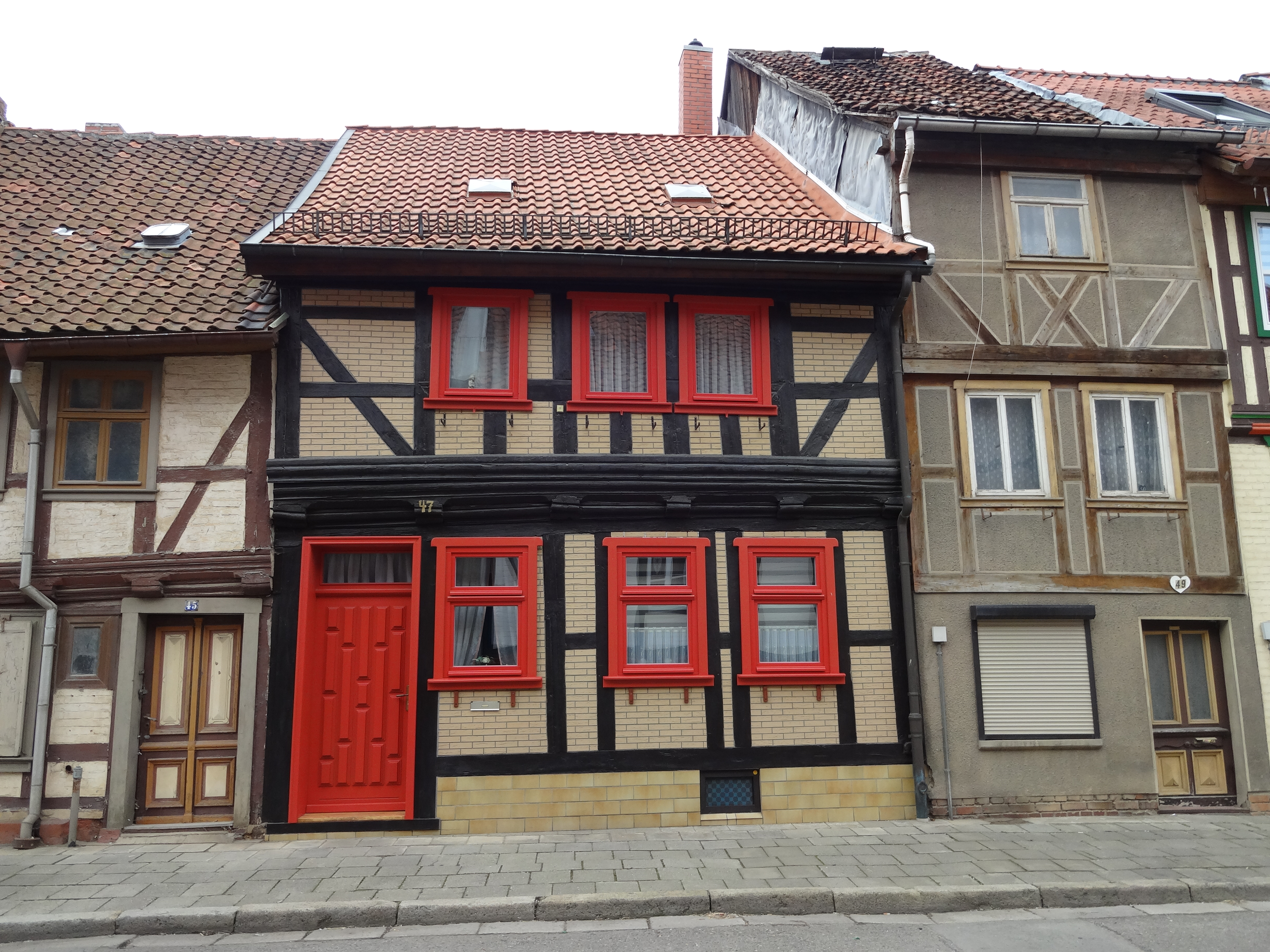 denkmalgeschütztes Fachwerkhaus in der Kornstraße 47 in Derenburg, Ortsteil von Blankenburg (Harz)